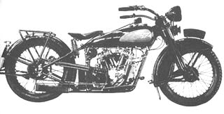 CWS M 55 S-III.